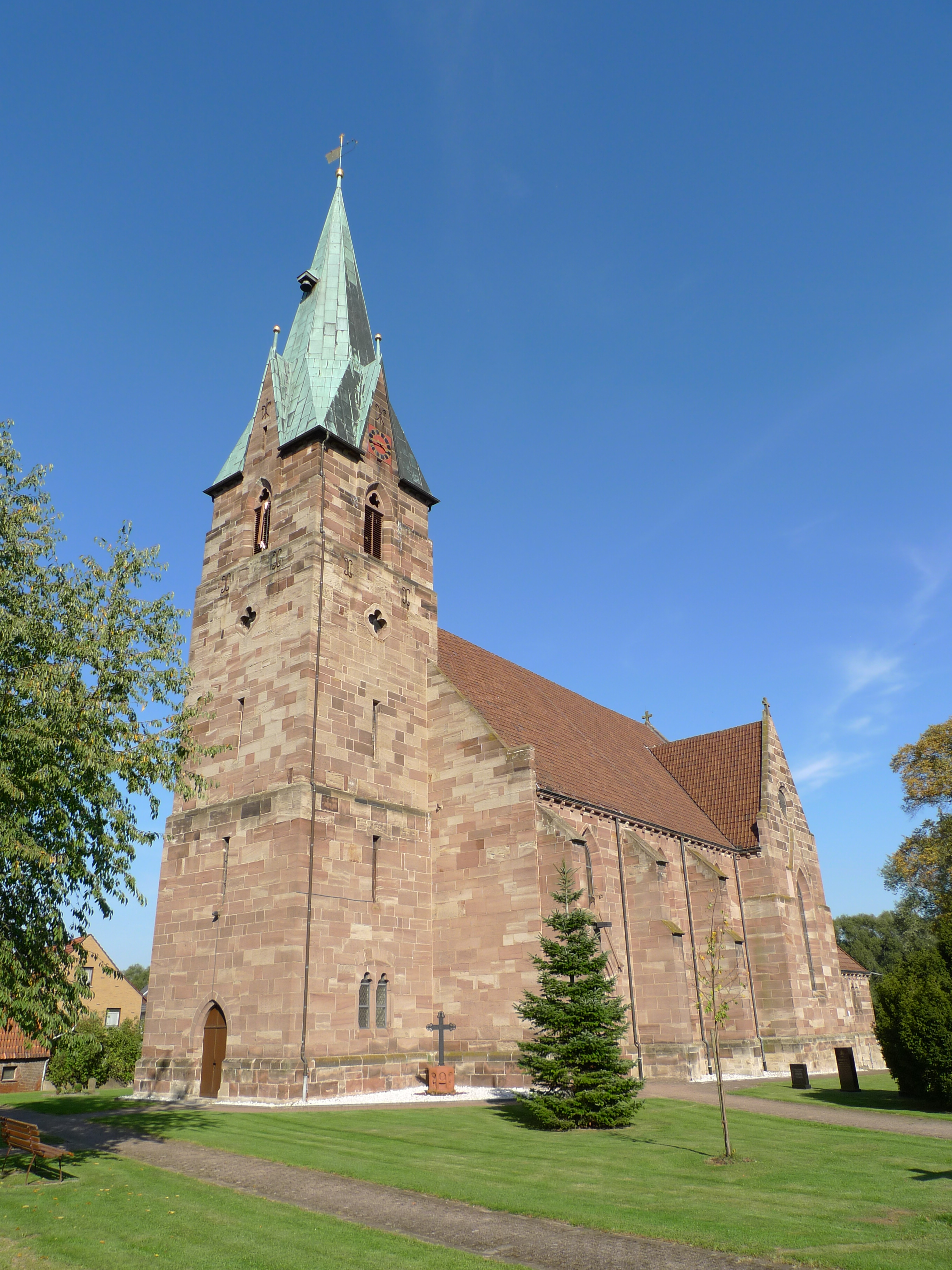 Katholische St. Andreaskirche in Rüdershausen